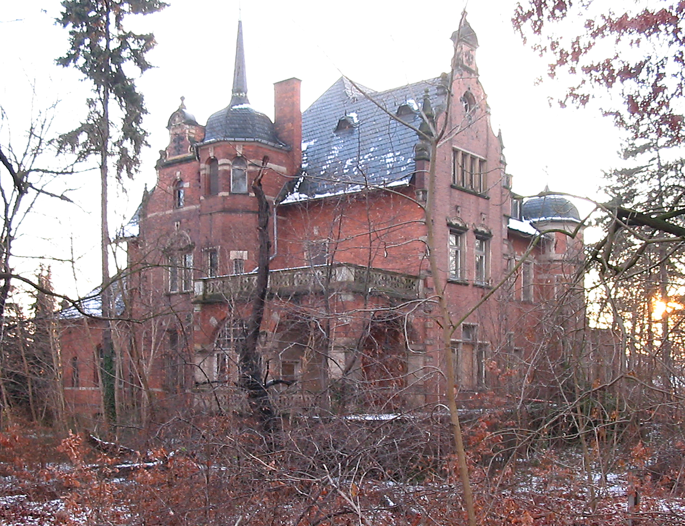 Radebeul, Villa Kolbe, von Nordwesten